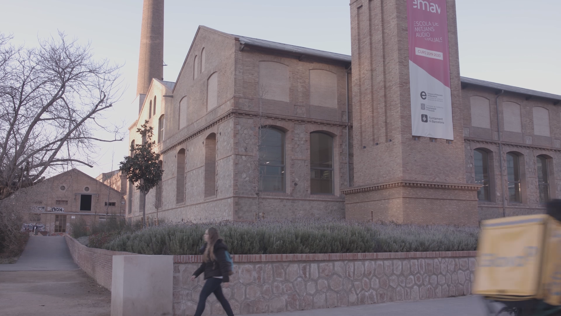 Imatge de la façana de la nova seu de l'EMAV.